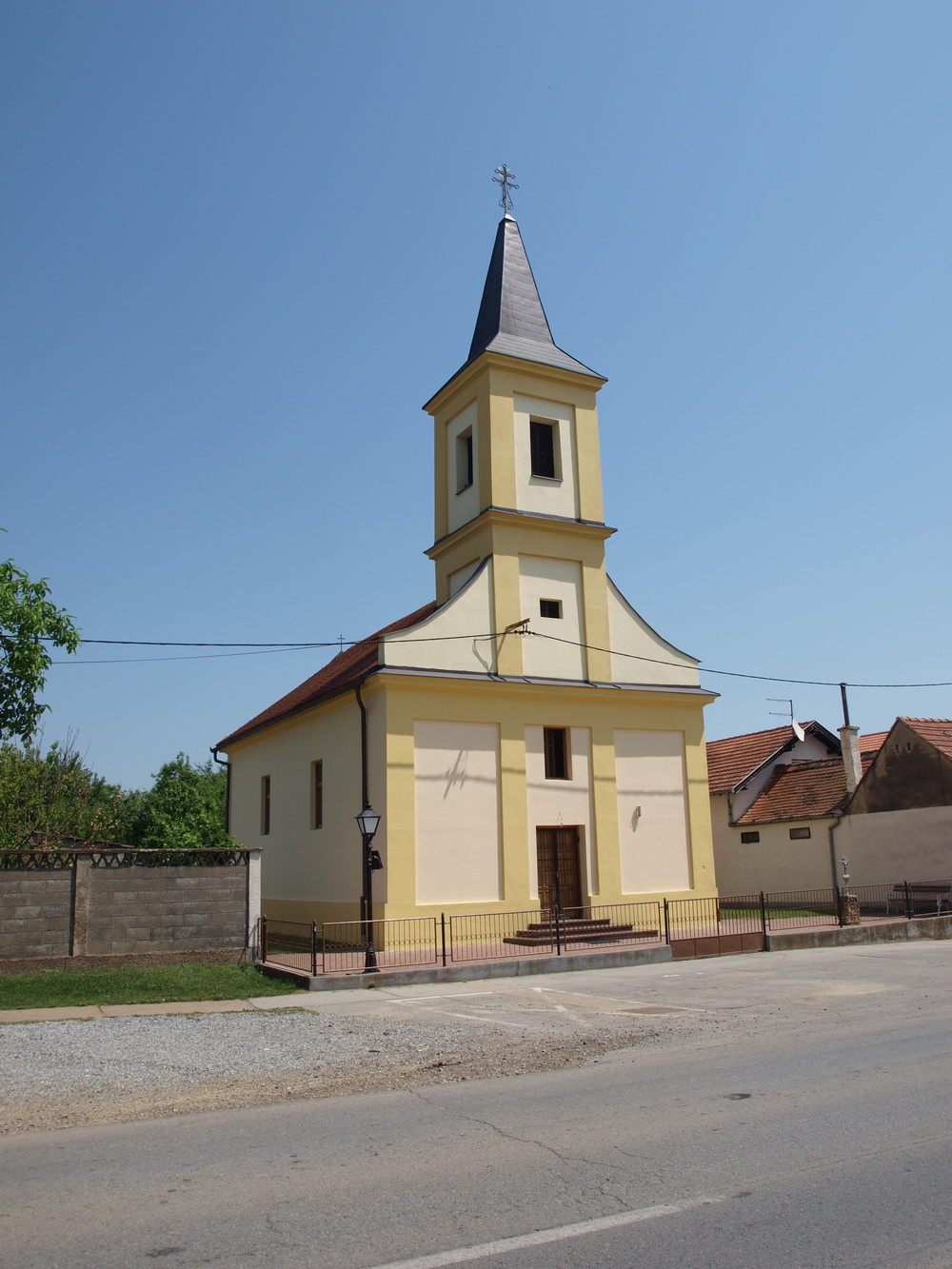 Crkva u Vranovcima, Brodsko-posavska županija.